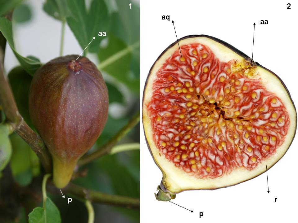 Sícono de la higuera (Ficus carica) en vista superficial (1) y corte longitudinal (2), pedúndulo (p), apertura apical (aa), receptáculo (r), aquenio (aq).